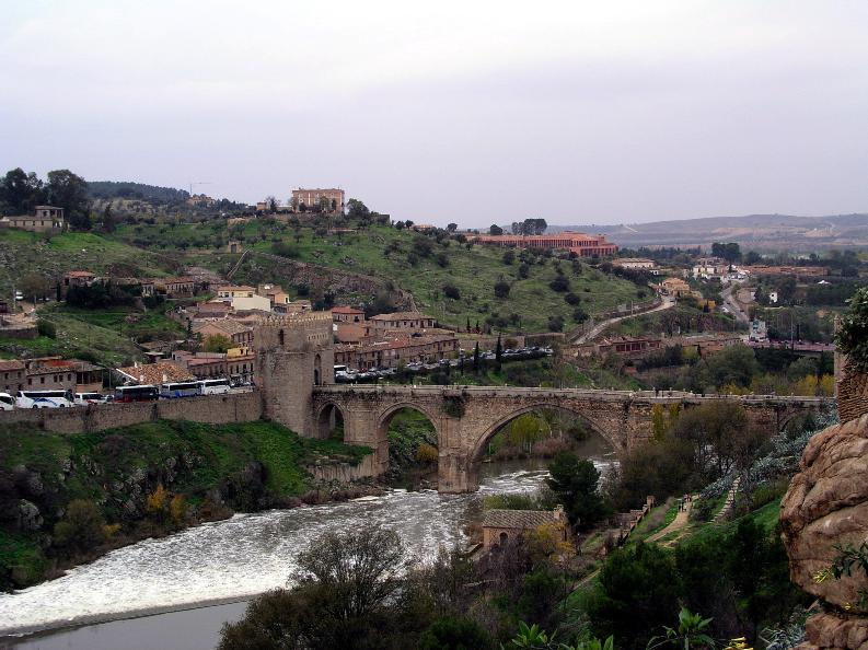 Puente de San Martín, Toledo, España